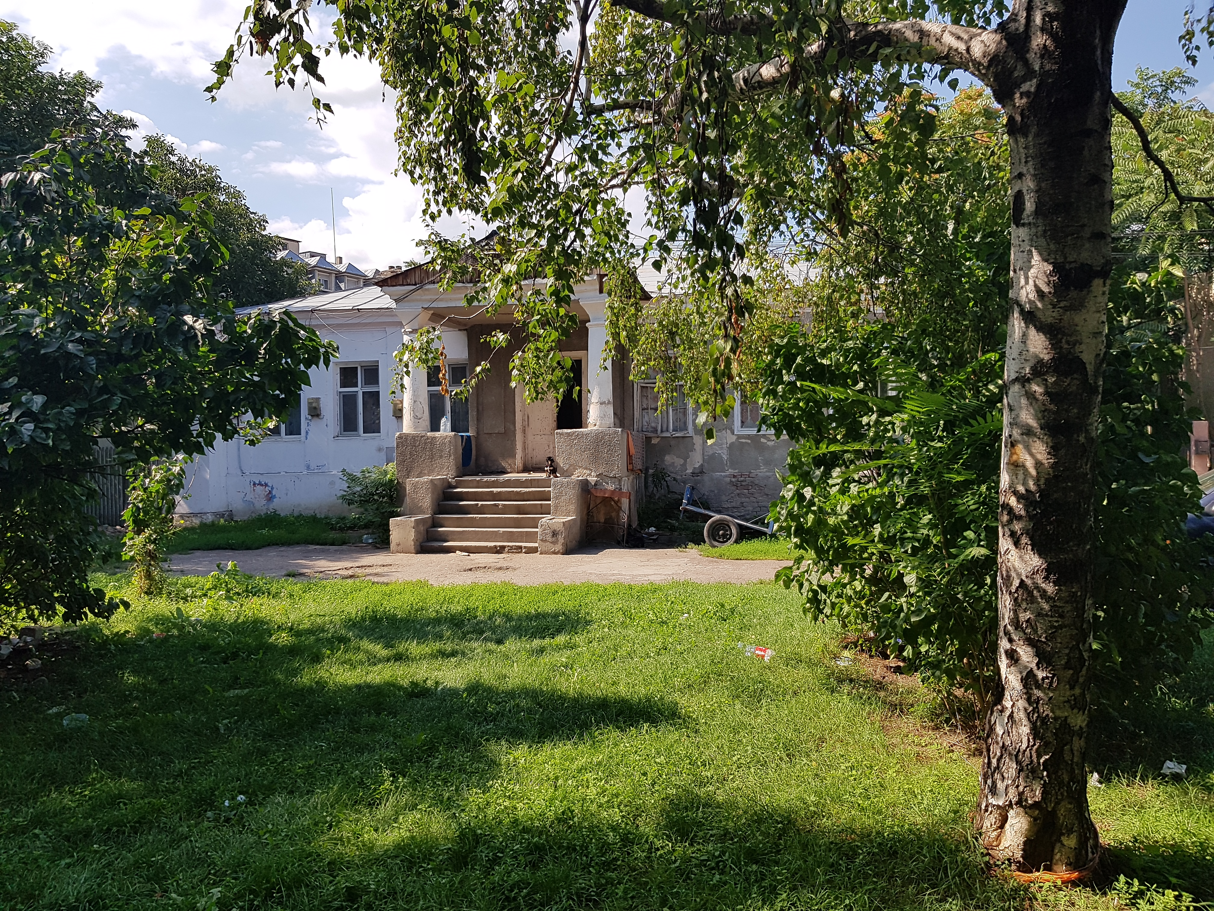 Casa Longinescu